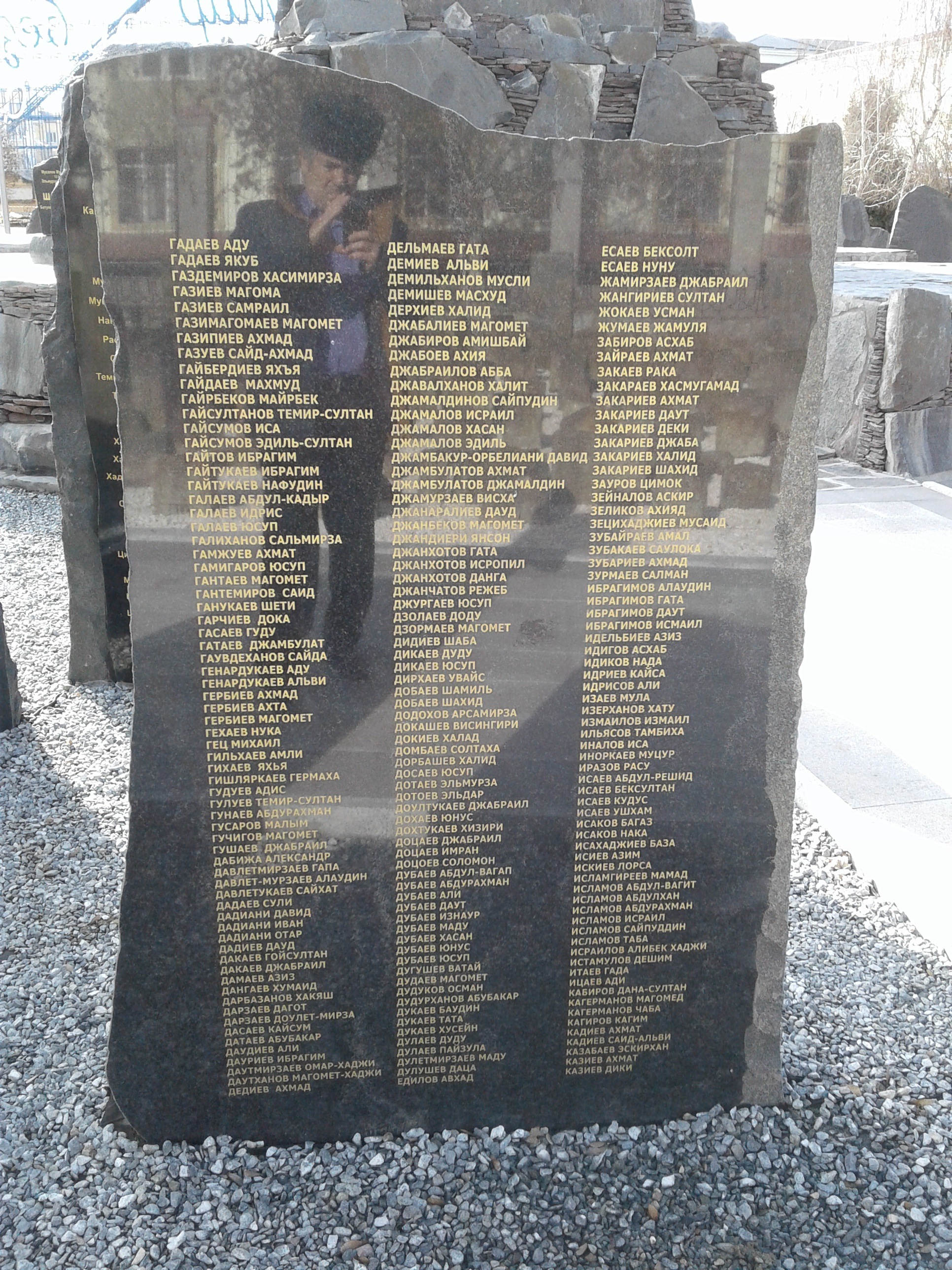 Мемориал памяти погибших в борьбе с терроризмом в Грозном